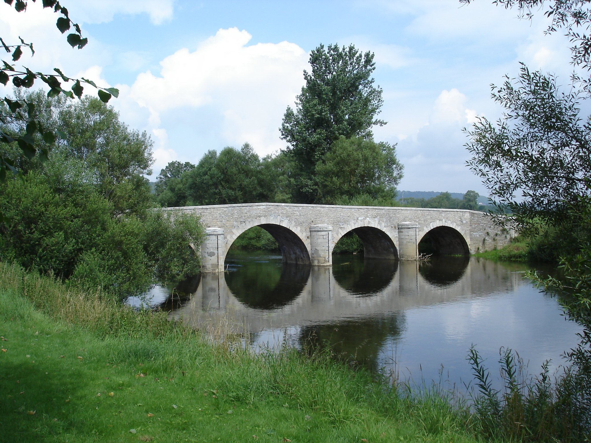 Pont sur la Meuse à Frebécourt (Vosges)